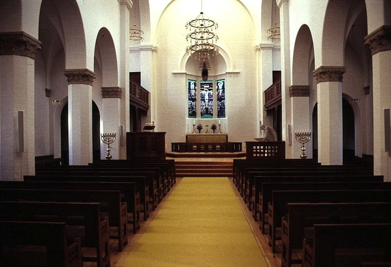 Esajas Kirke i Danmark. Skibet set mod øst